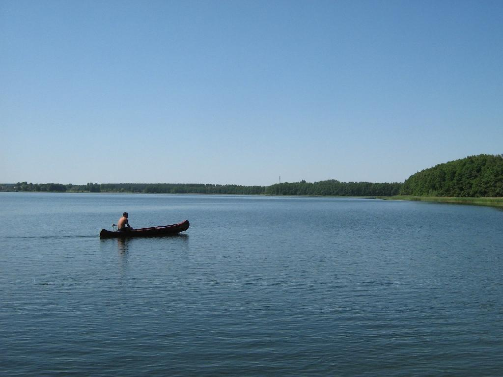 Der Käbelicksee, Müritz-Nationalpark, Mecklenburgische Seenplatte, Mecklenburg.